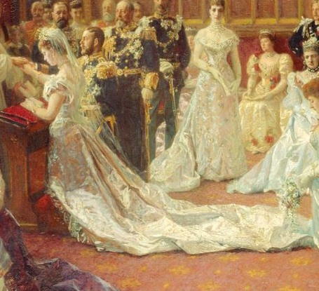 Detail, Koningin Victoria